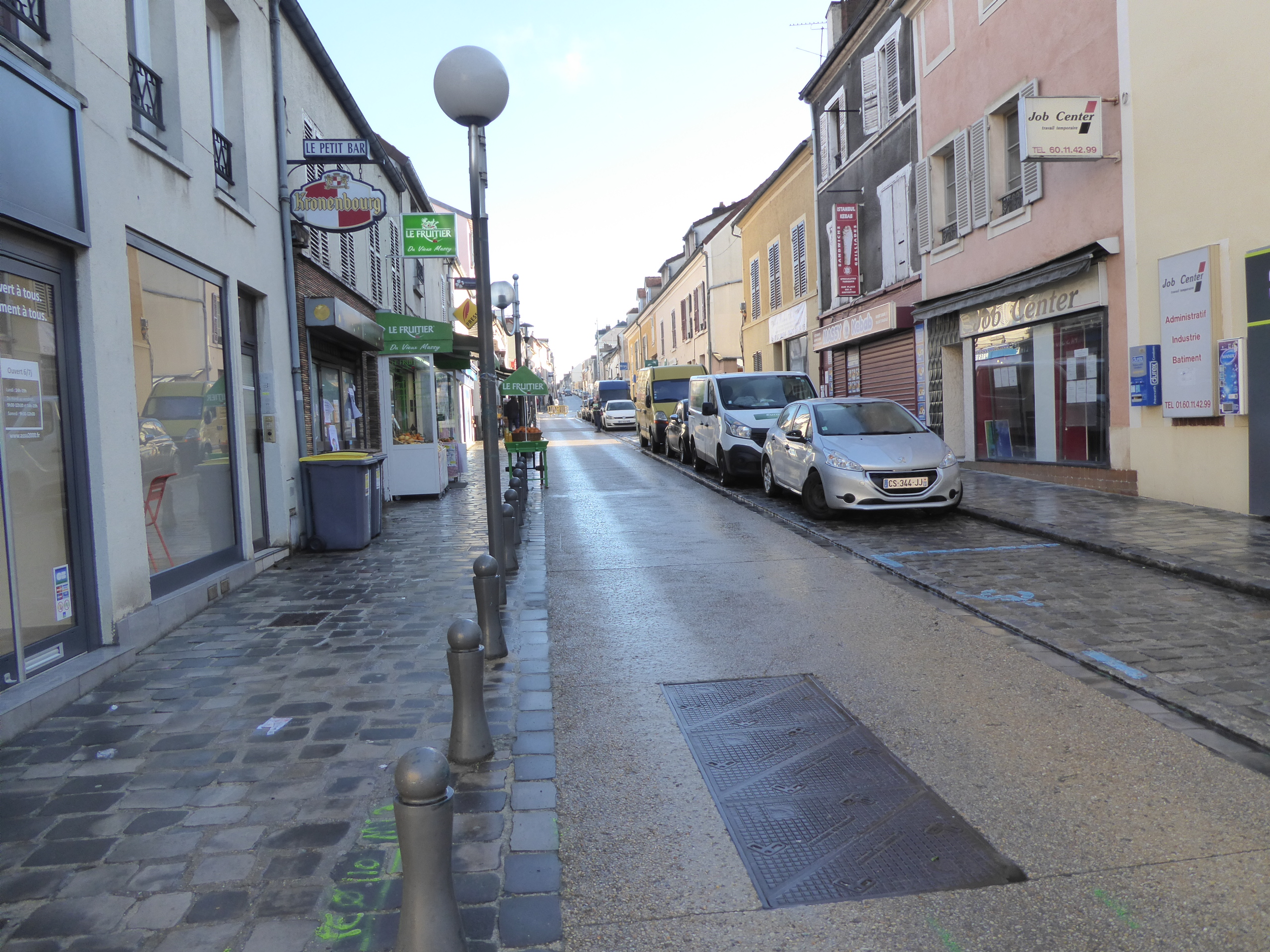 Rue Gabriel Péri Massy 1 partie commerçante